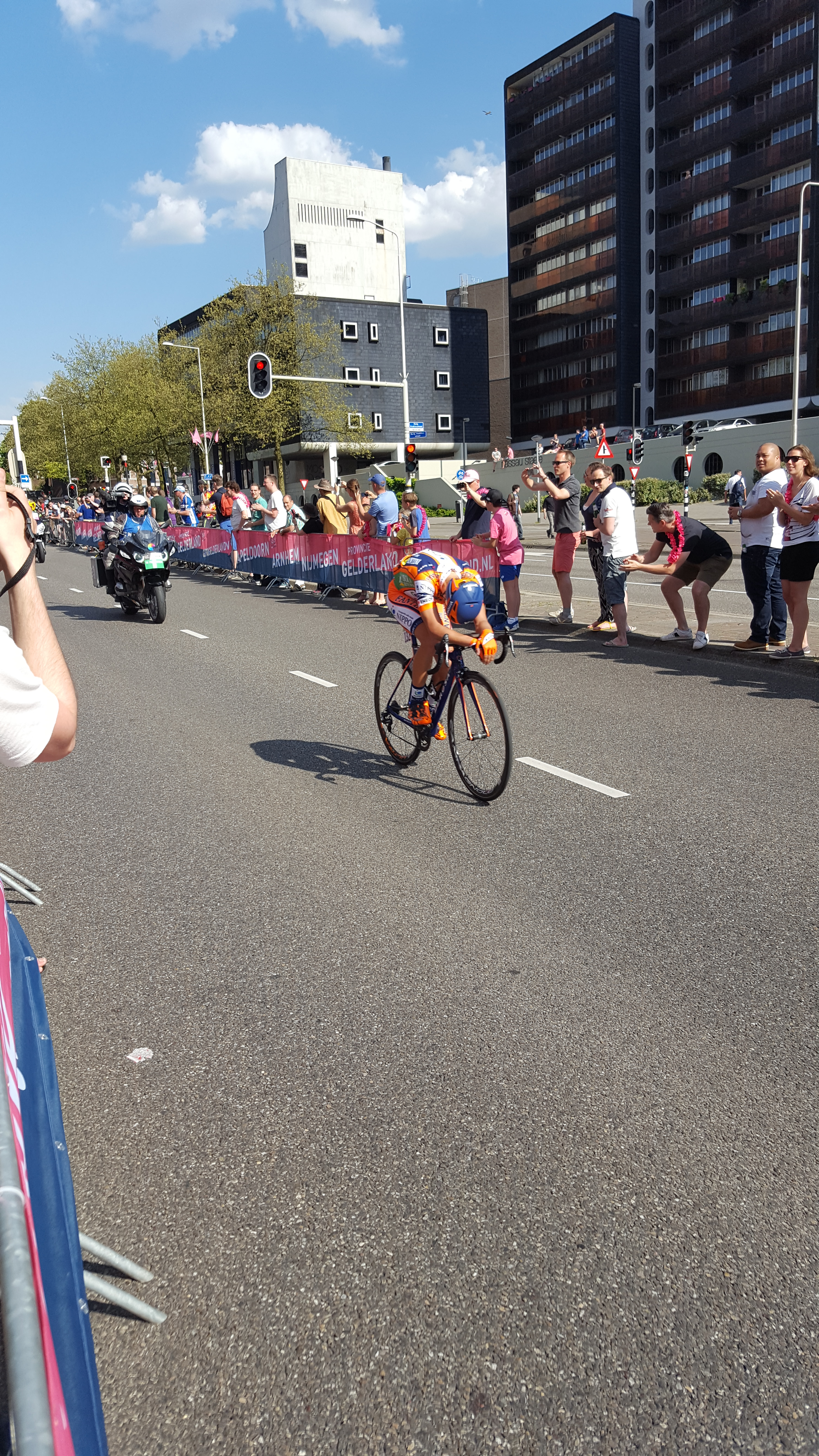 Giro d'Italia 2016 stage 2: Giacomo Berlato ahead at the Tunnelweg in the second of three rounds in Nijmegen.